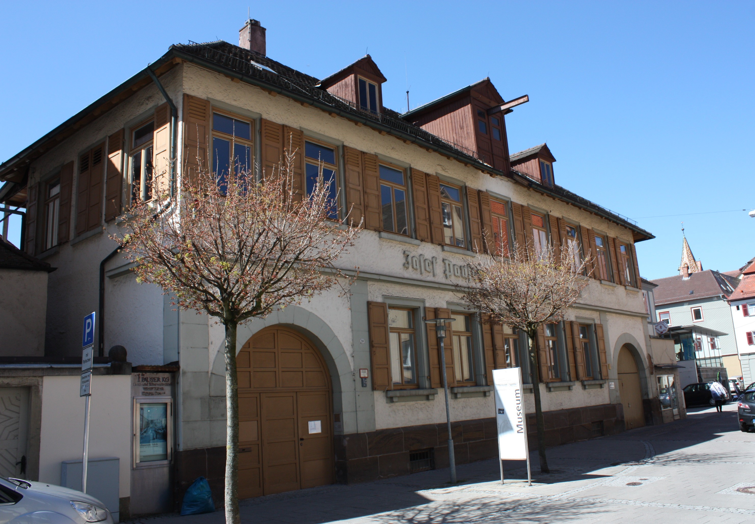 Gebäude der ehemaligen Ott-Pauser'schen Silberwarenfabrik in Schwäbisch Gmünd. Heute ein städtisches Museum.